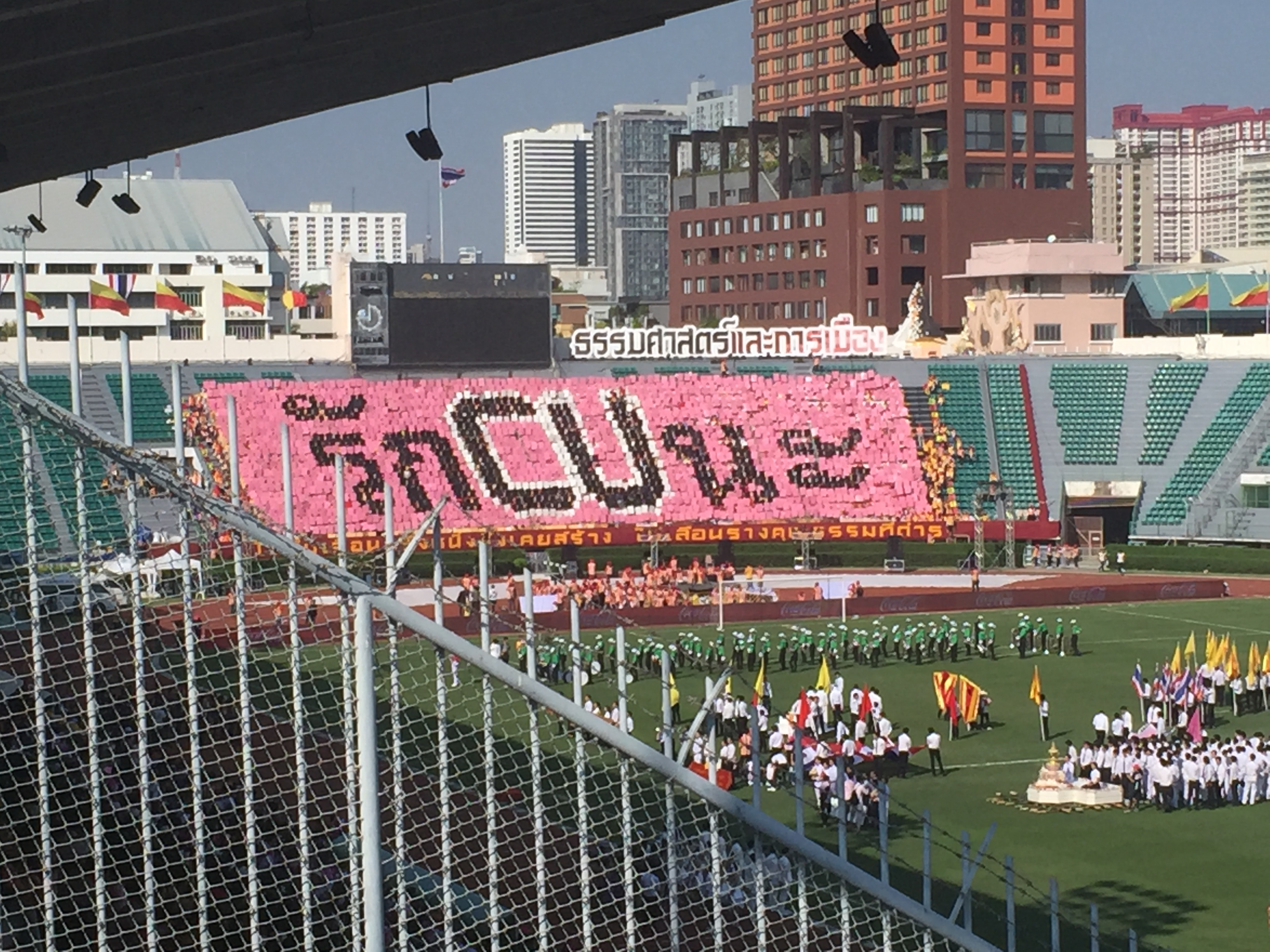 อัฒจันทร์ฝั่งมหาวิทยาลัยธรรมศาสตร์แปรอักษรเป็นคำว่า "รัก CU นะ" หรือหมายถึง รักจุฬาลงกรณ์มหาวิทยาลัยนะ